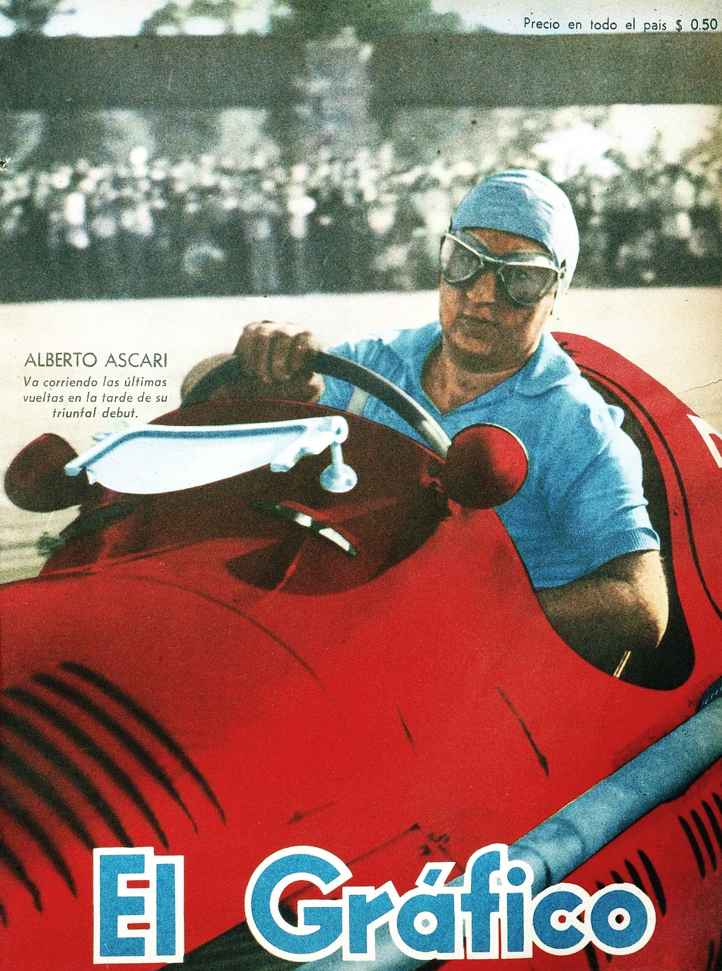 El Grafico del 11 de Marzo de 1949. Edicion 1544